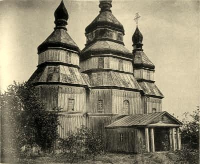 собор Таращі